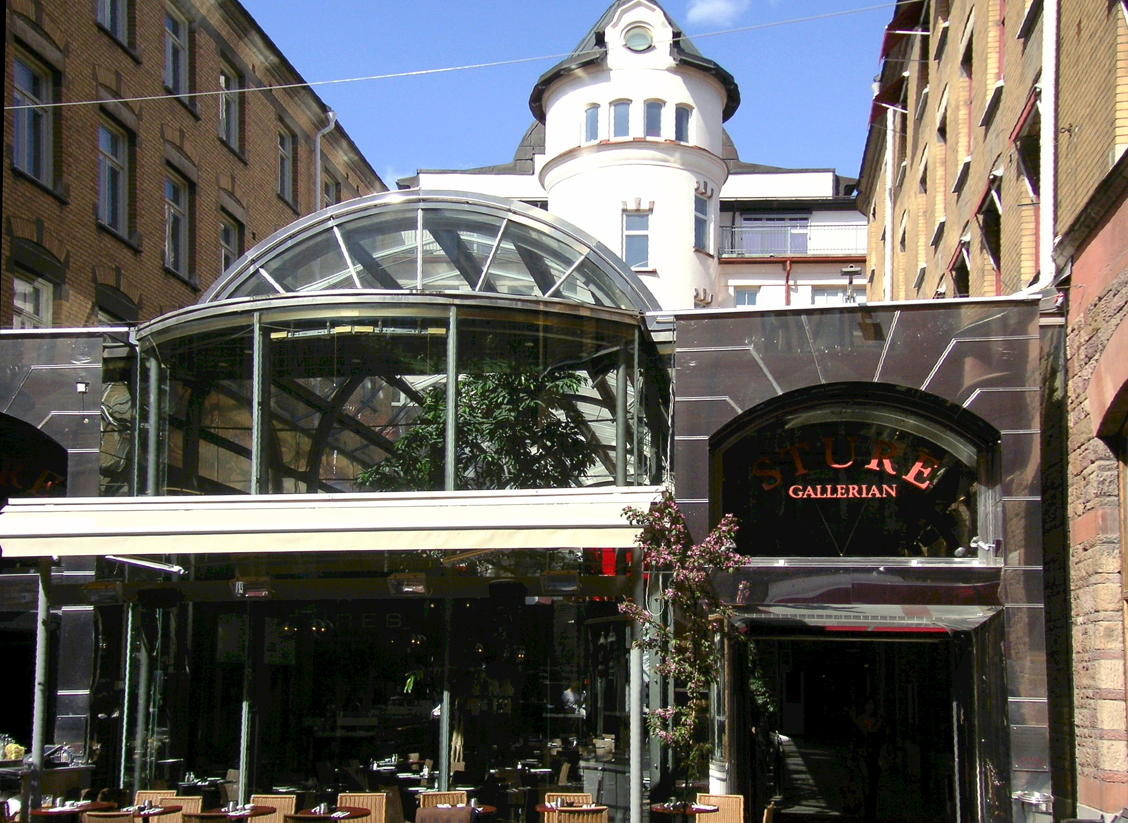 Sturegallerian in Stockholm, tornet i bakgrunden hörde till Freys Hyrverk